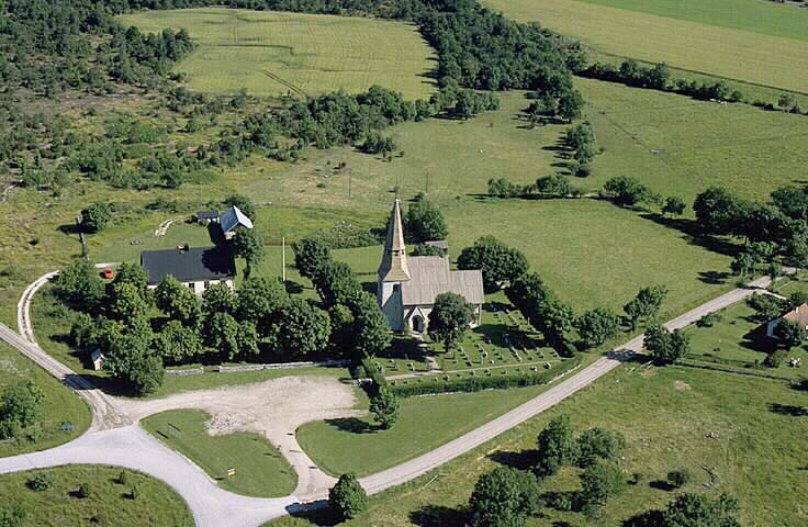 Motiv: Ardre kyrka Nyckelord: Flygbilder, Riksintressen Kategori: Kyrkomiljö Ardre kyrka